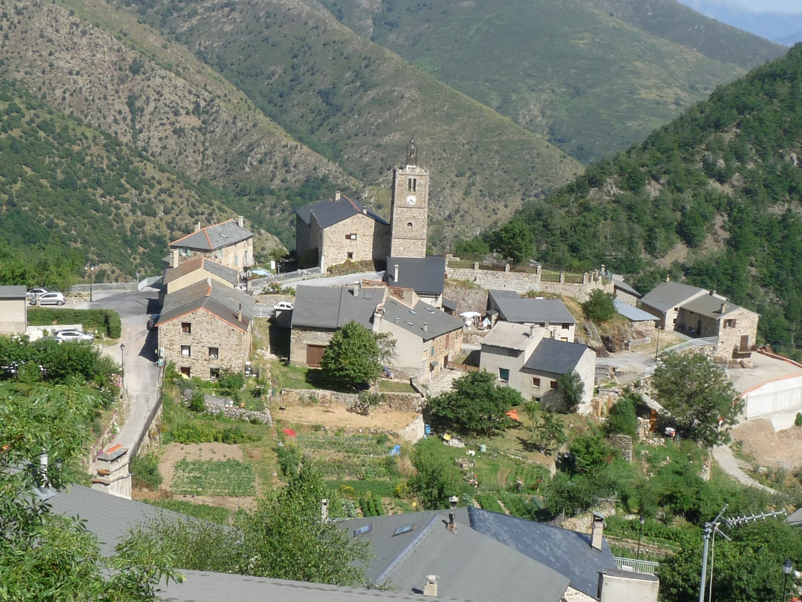 Railleu, Pyrénées-Orientales, France